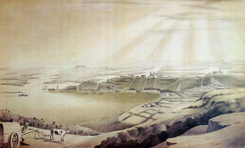 Herrmann Wendroth: Porto Alegre vista do sul, c. 1852. Aquarela.